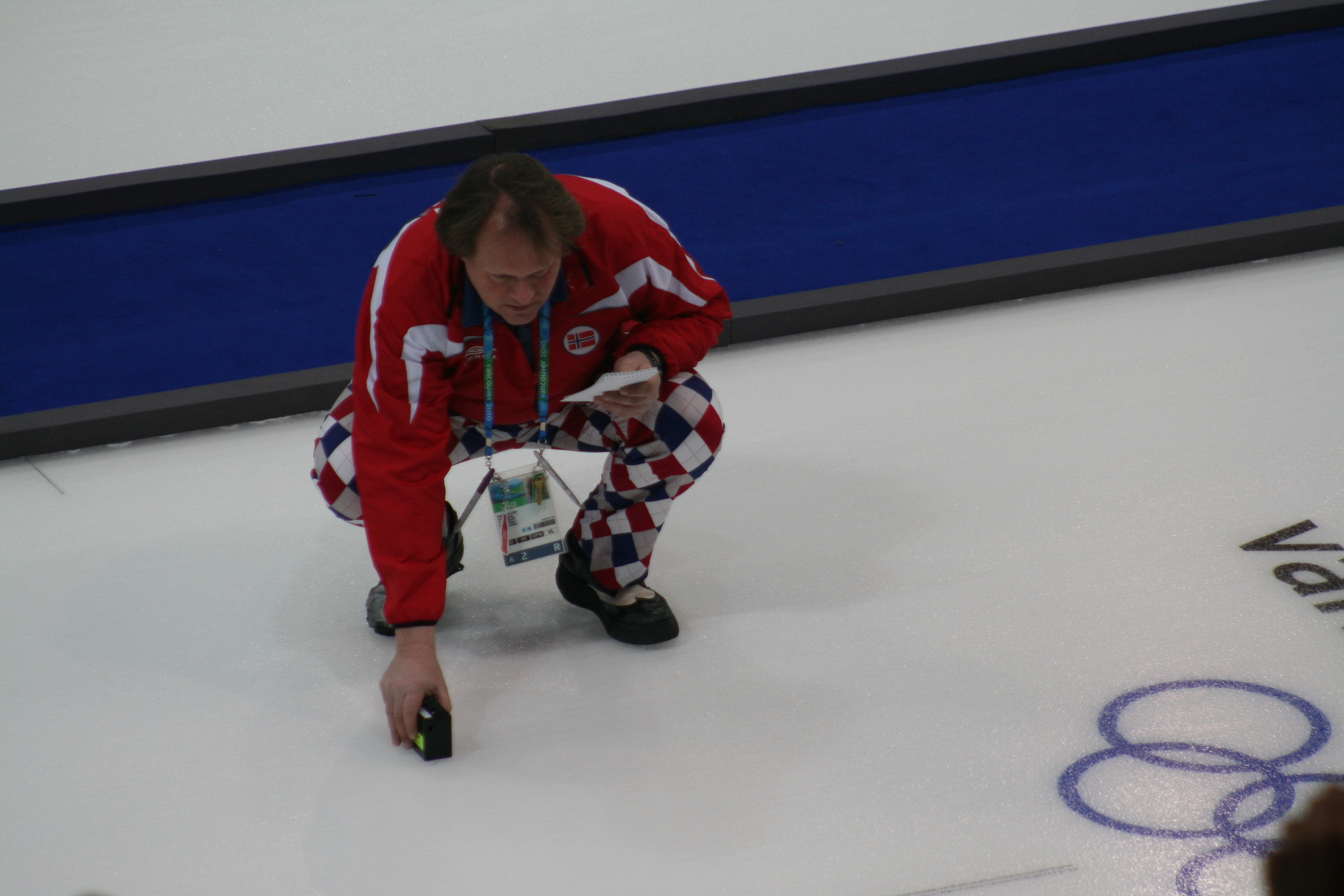 Pål Trulsen - NOR